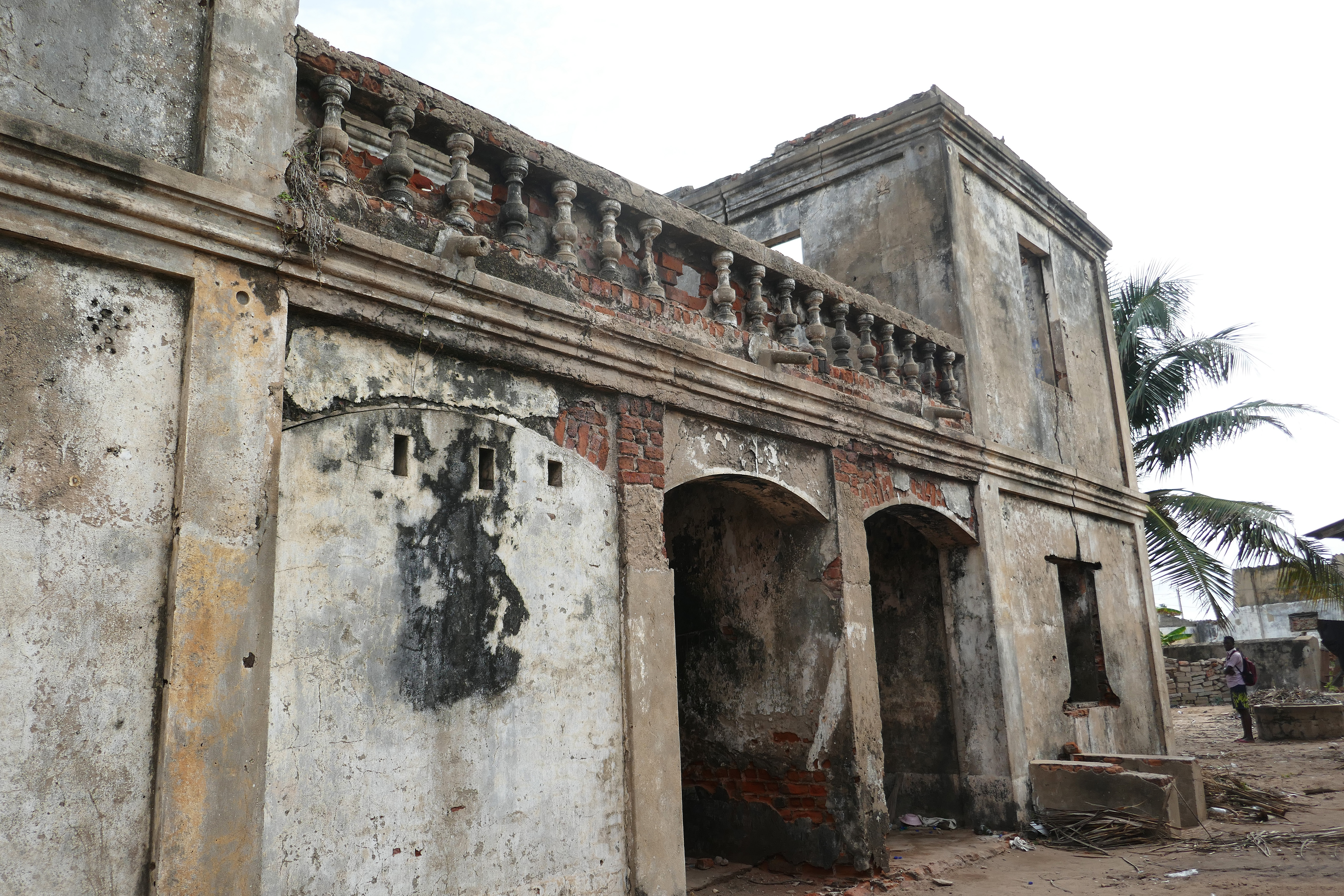 Architecture coloniale à Grand-Popo (Bénin).